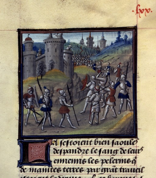 Siège de la citadelle d'Antioche (1098)